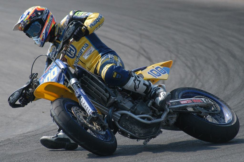 Eddy Seel - campione del mondo di supermoto, o supermotard, nell'anno 2003 - ritratto durante una derapata: una sbandata controllata con la moto di traverso, che è la peculiarità del supermoto.